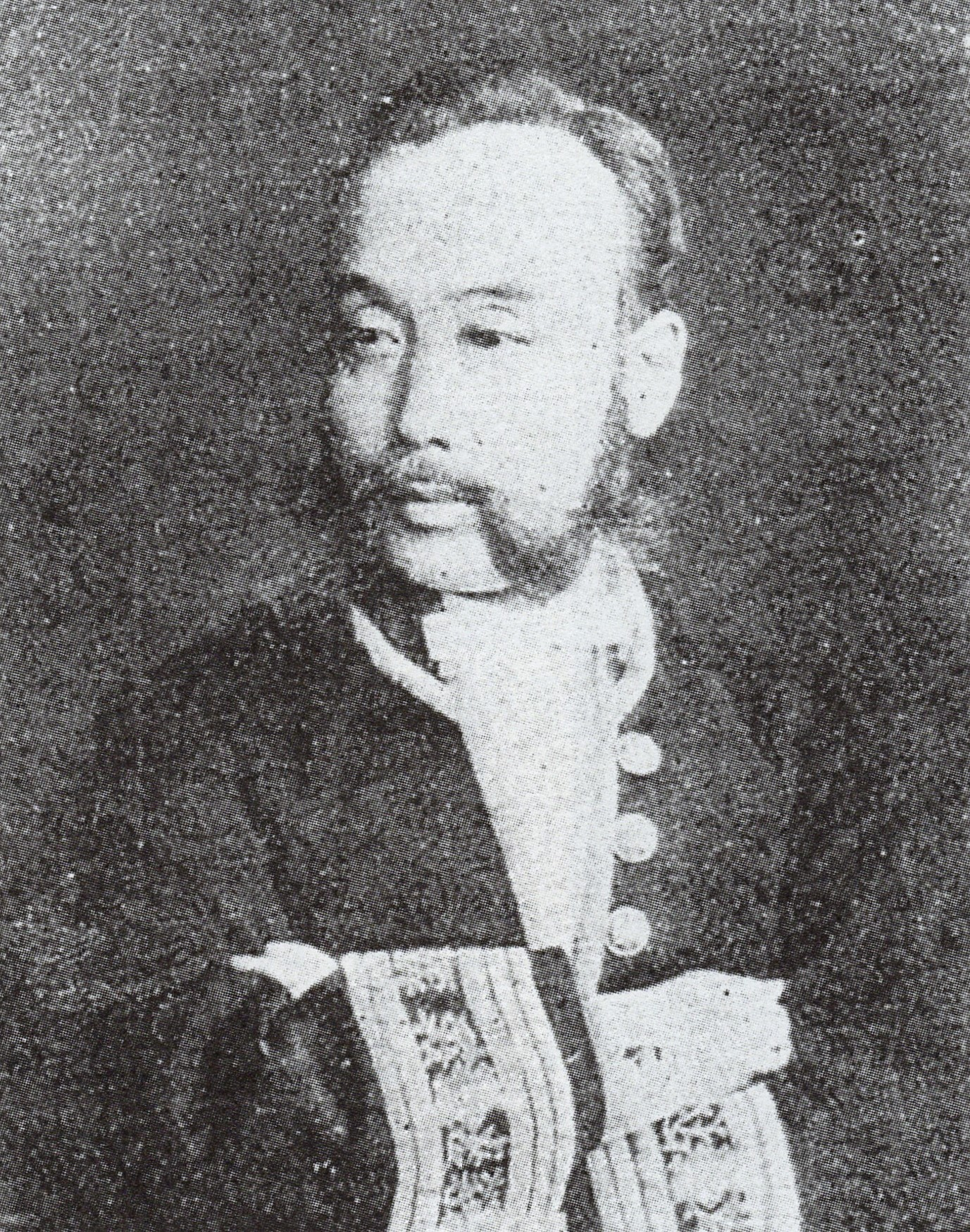 澤太郎左衛門の肖像写真。